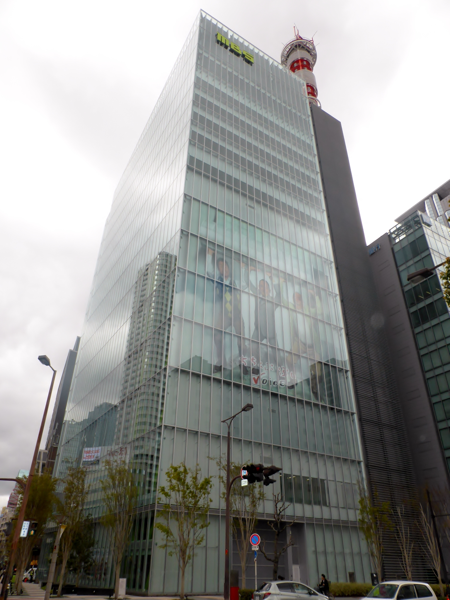 株式会社毎日放送本社タワーBを撮影。